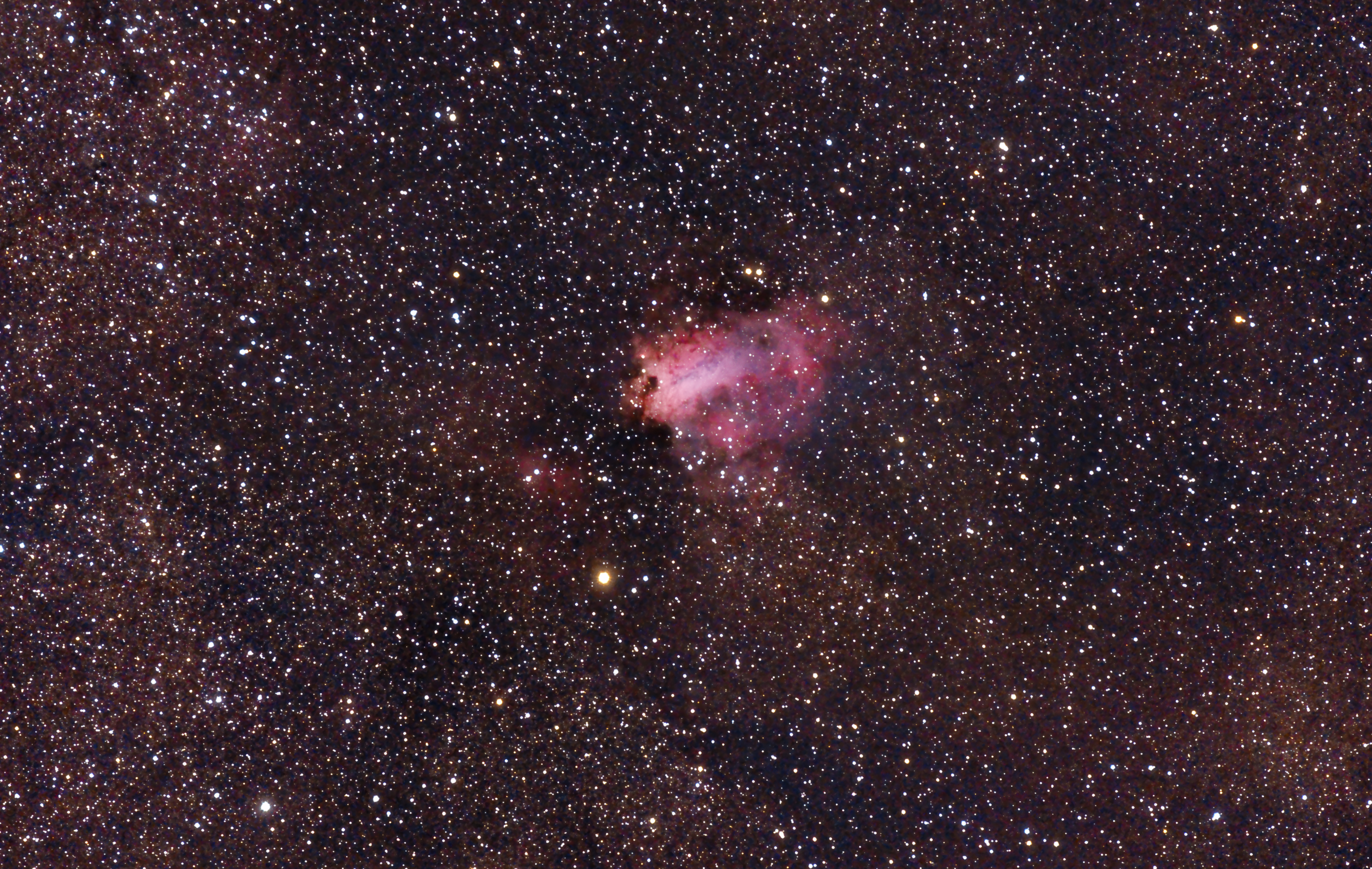 Nebulosa Omega o M 17 tomada desde el Observatorio Astronómico Los Molinos, Montevideo, Uruguay.